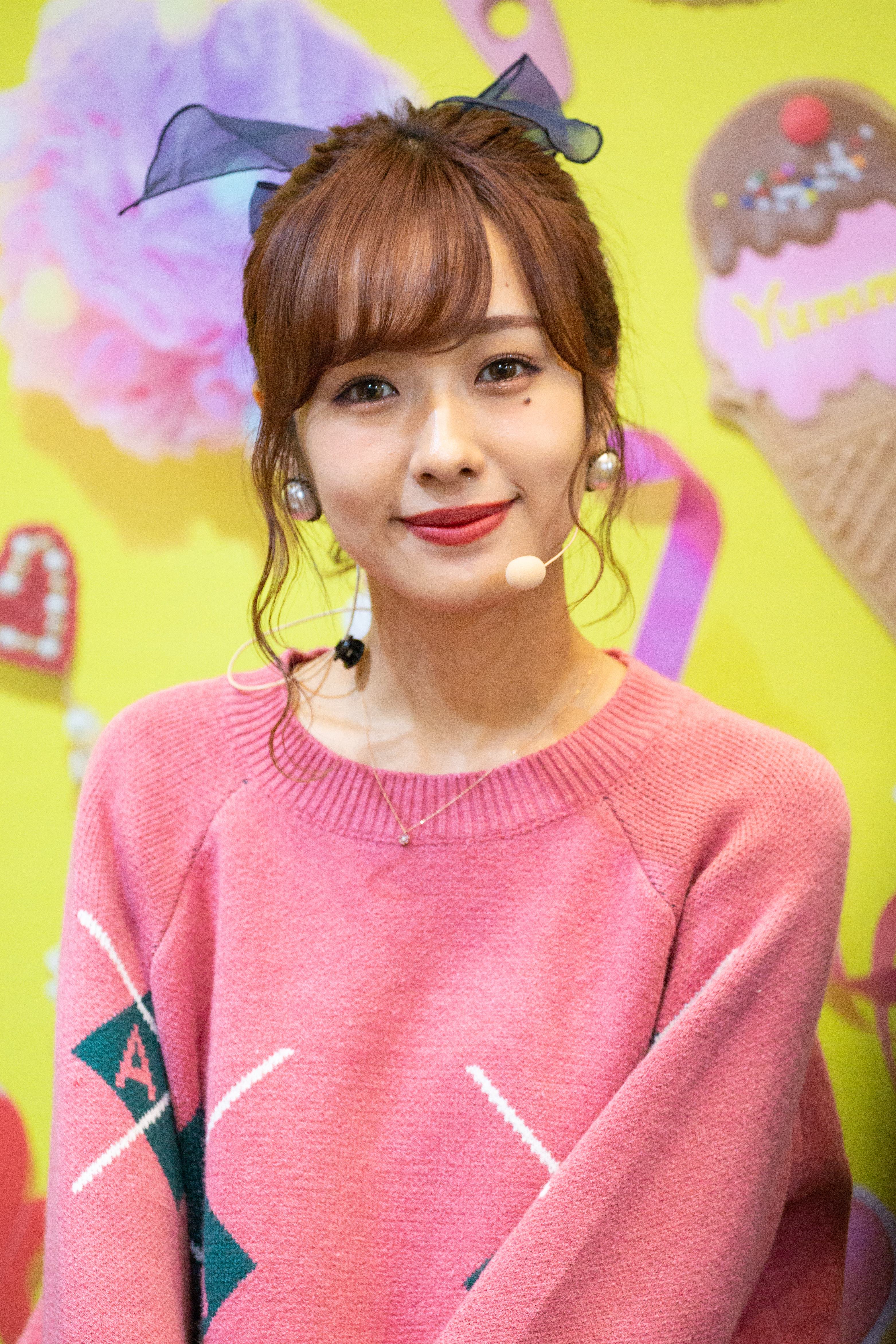 Super! C CHANNEL 2018 前田希美